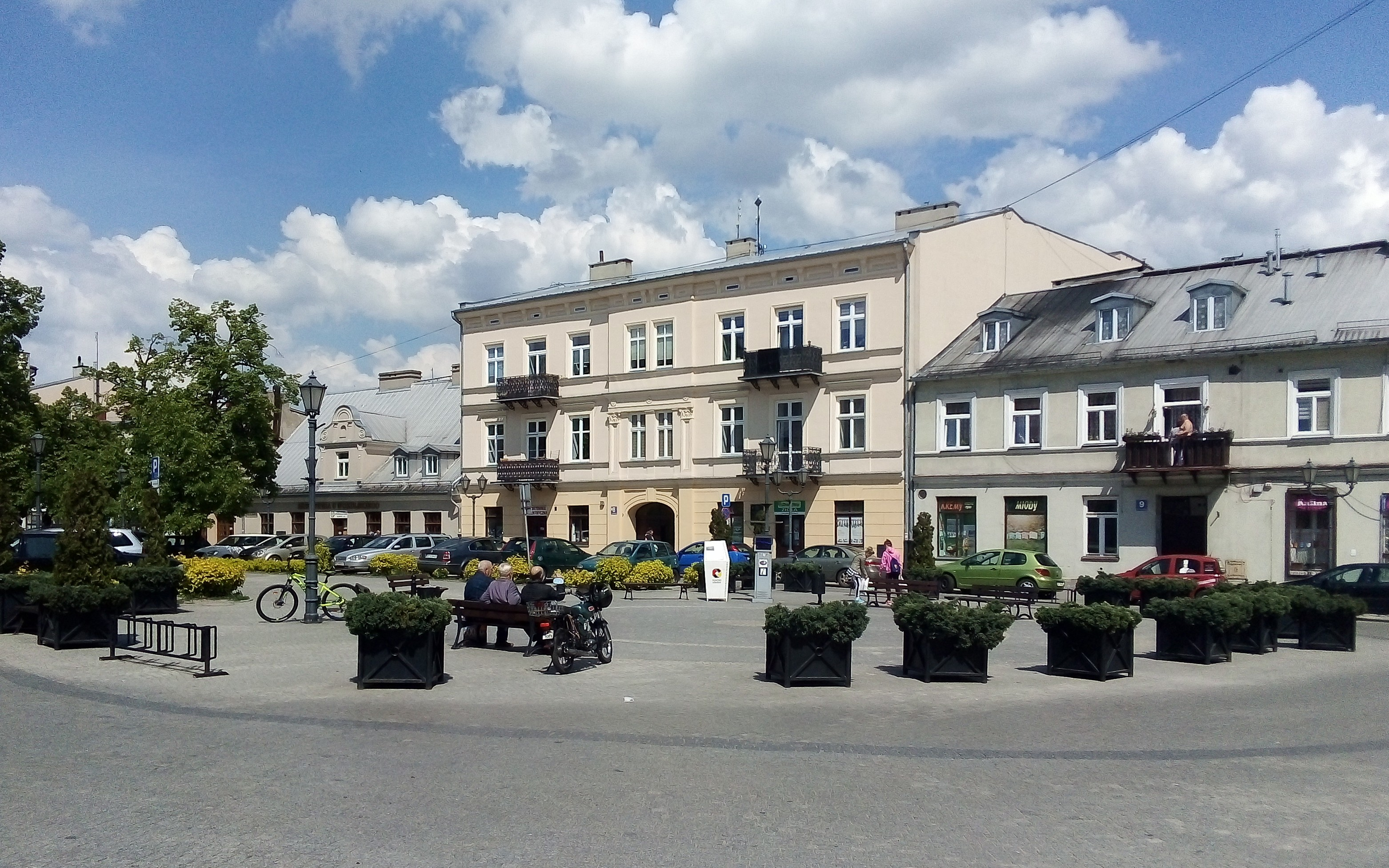 Stefana Czarnieckiego Square in Piotrków Trybunalski in Poland.